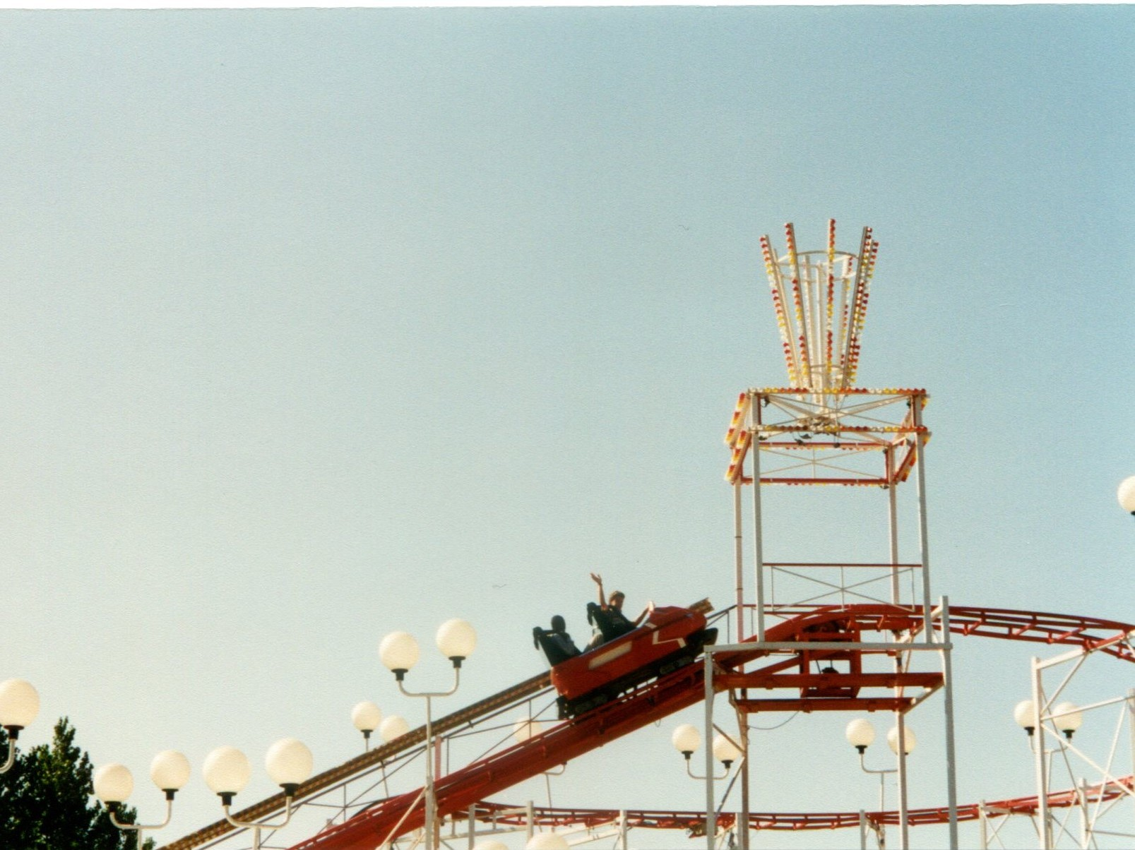 MeliparkJubile